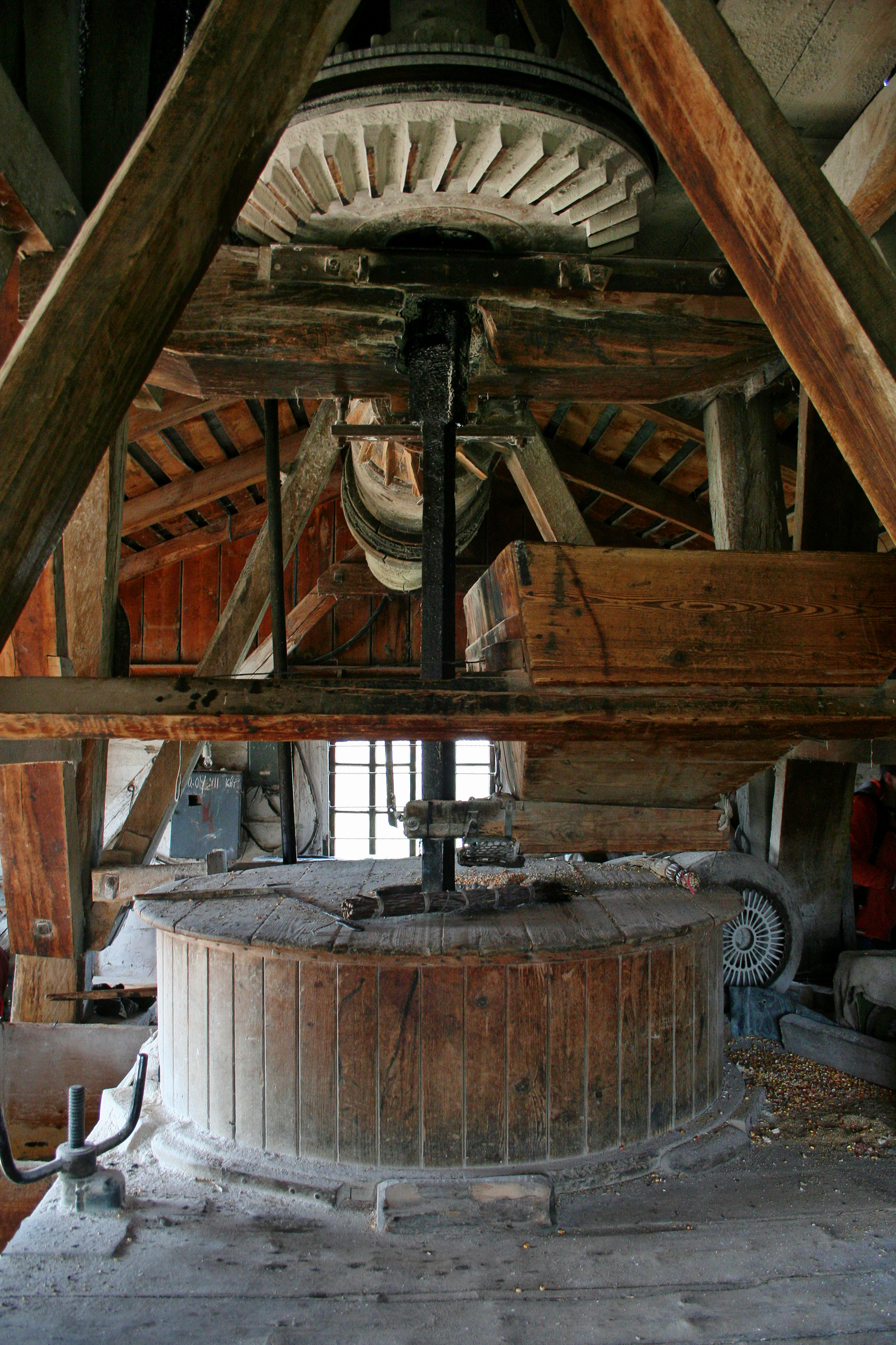 Вітряк, Прохорівка